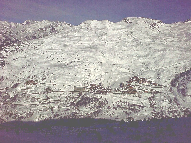 Massif du Gros Crey et la station Valmeinier 1800.